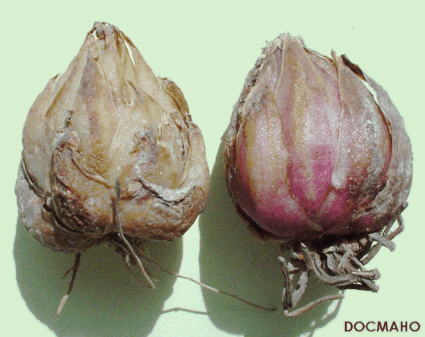 Lilium wallichianum bulbs